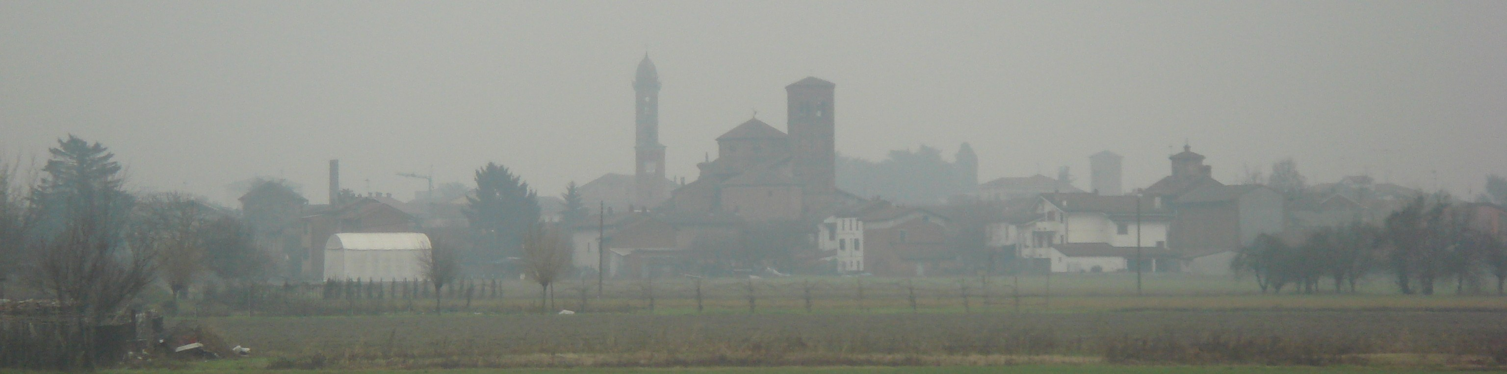 Panorama invernale di Castellazzo Bormida, fotografato in gennaio 2011 dal viale Madonnina dei centauri.